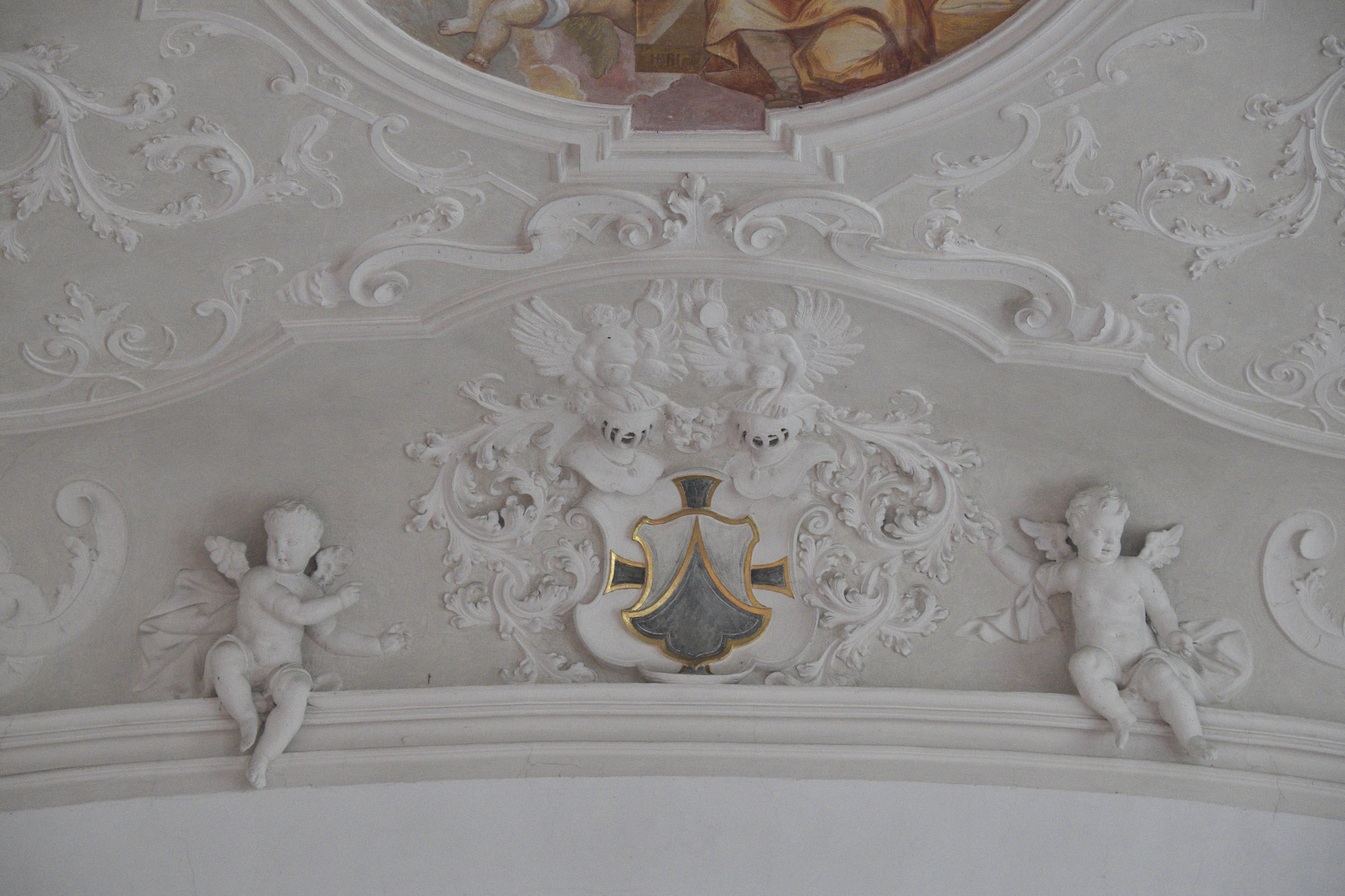 Ehemaliges Deutschordensschloss, Schloss Blumenthal, in Klingen, einem Stadtteil von Aichach im Landkreis Aichach-Friedberg (Bayern), ehemalige Schlosskapelle, katholische Filialkirche St. Maria, Deutschordenswappen über dem Chorbogen, Wappen von Johann Franz von Weichs